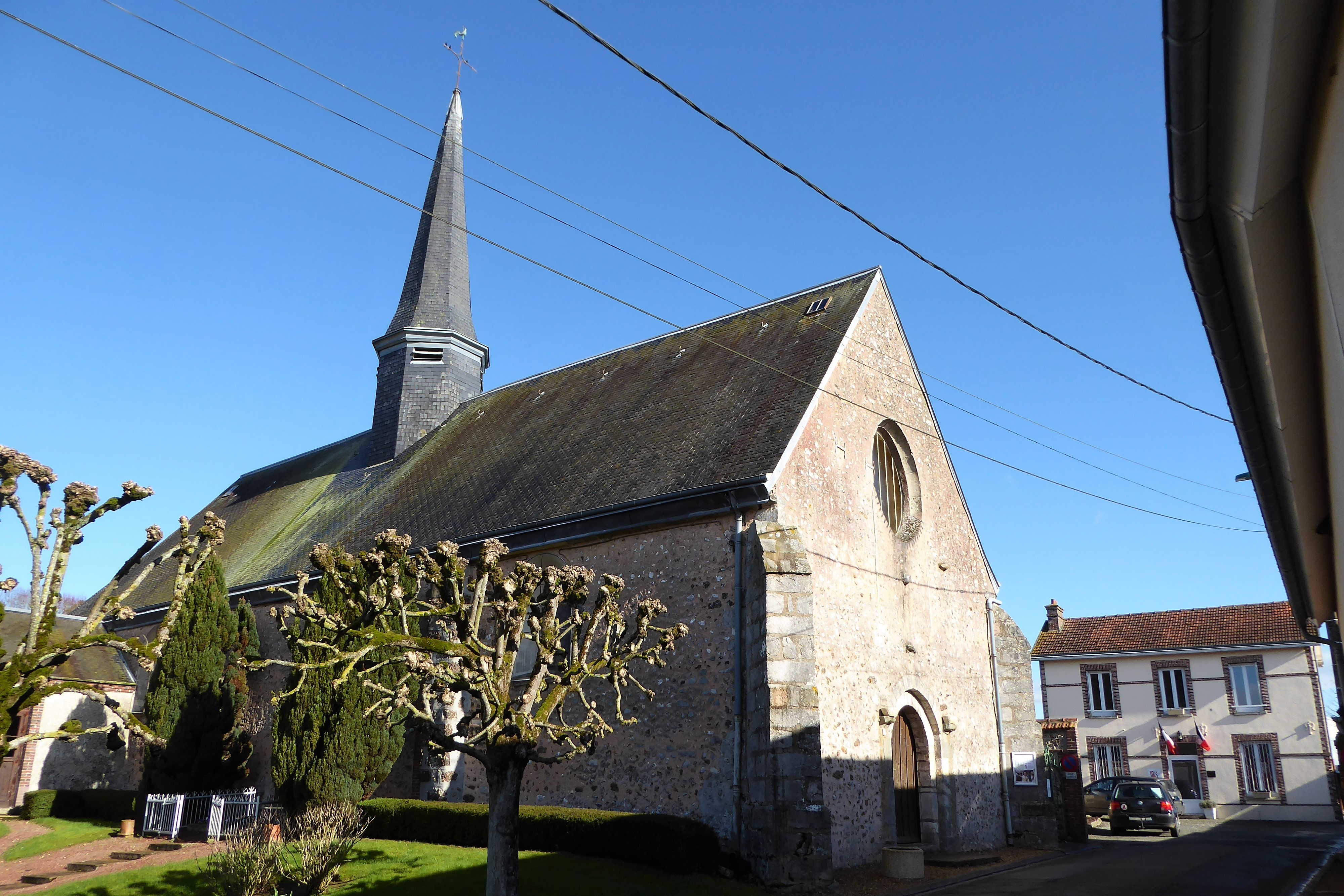 mairie, église Saint-Gilles et grilles du monument aux morts adossé au mur nord de l'église, Challet, Eure-et-Loir, France.